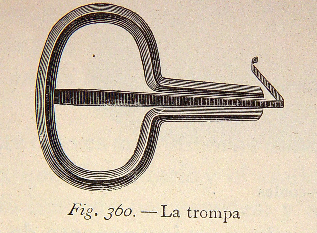 "La trompa". Ilustraciones pertenecientes al libro : El mundo físico : gravedad, gravitación, luz, calor, electricidad, magnetismo, etc. / A. Guillemin. - Barcelona Montaner y Simón, 1882